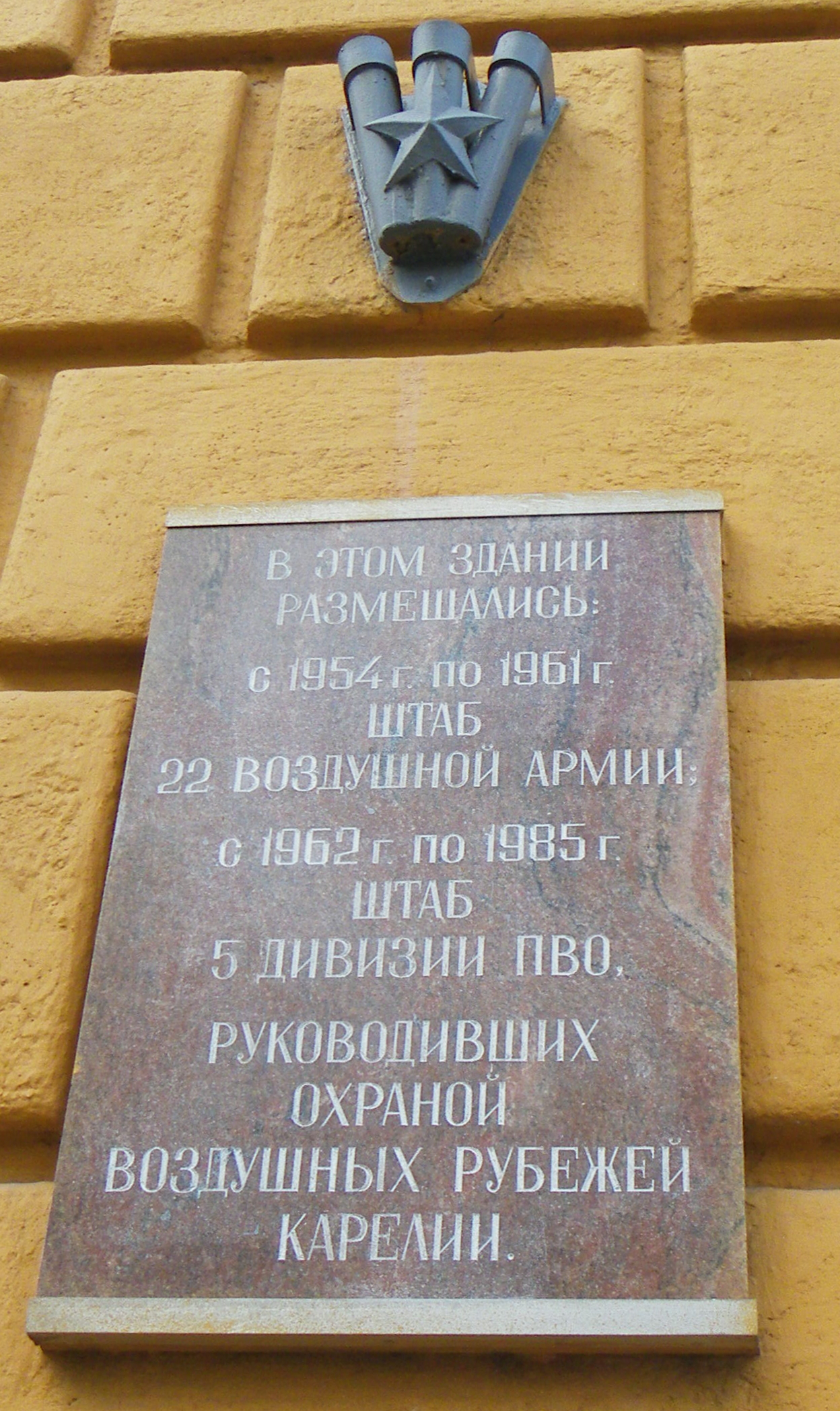 Памятная доска на здании бывшего штаба 22 воздушной армии в Петрозаводске. Свердлова, 8